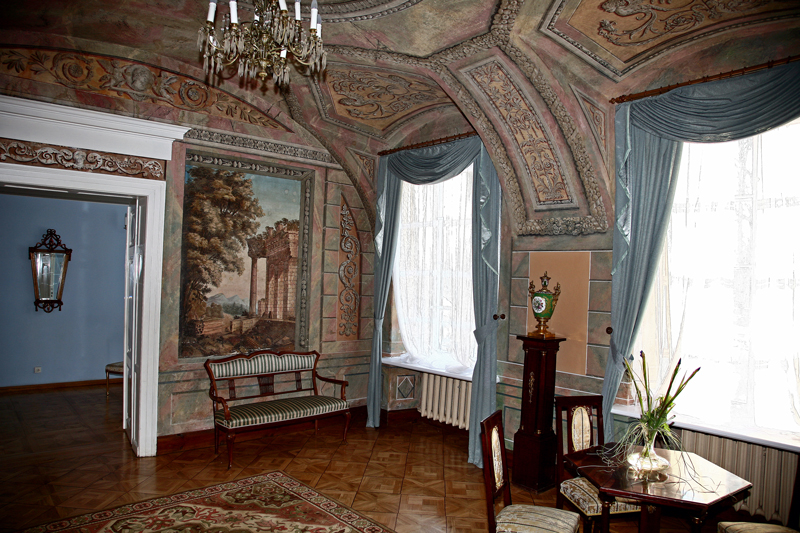 Wnętrza pałacu w Lubostroniu. Autor: Michał "Cronwood" Babilas